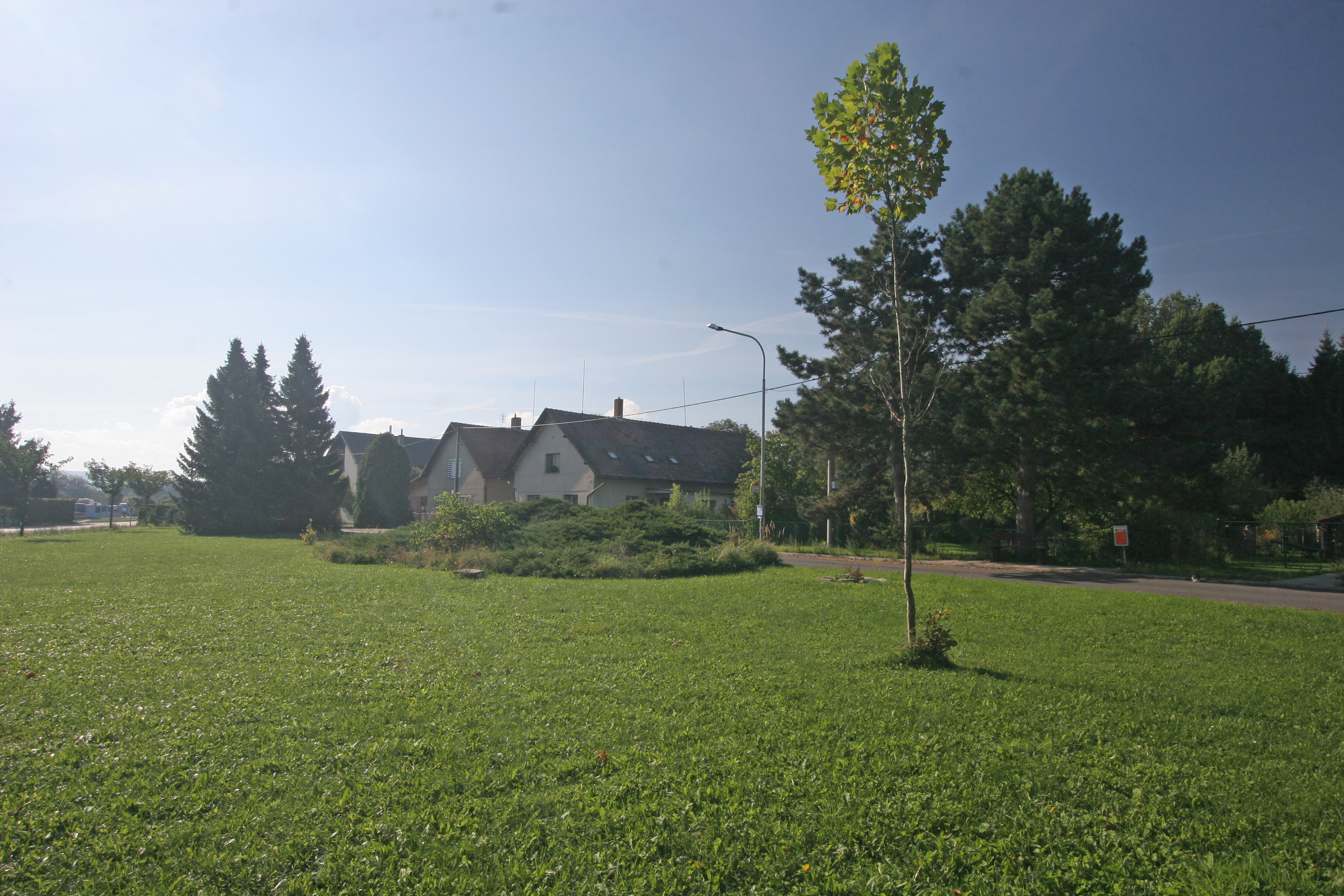 Nákle náves